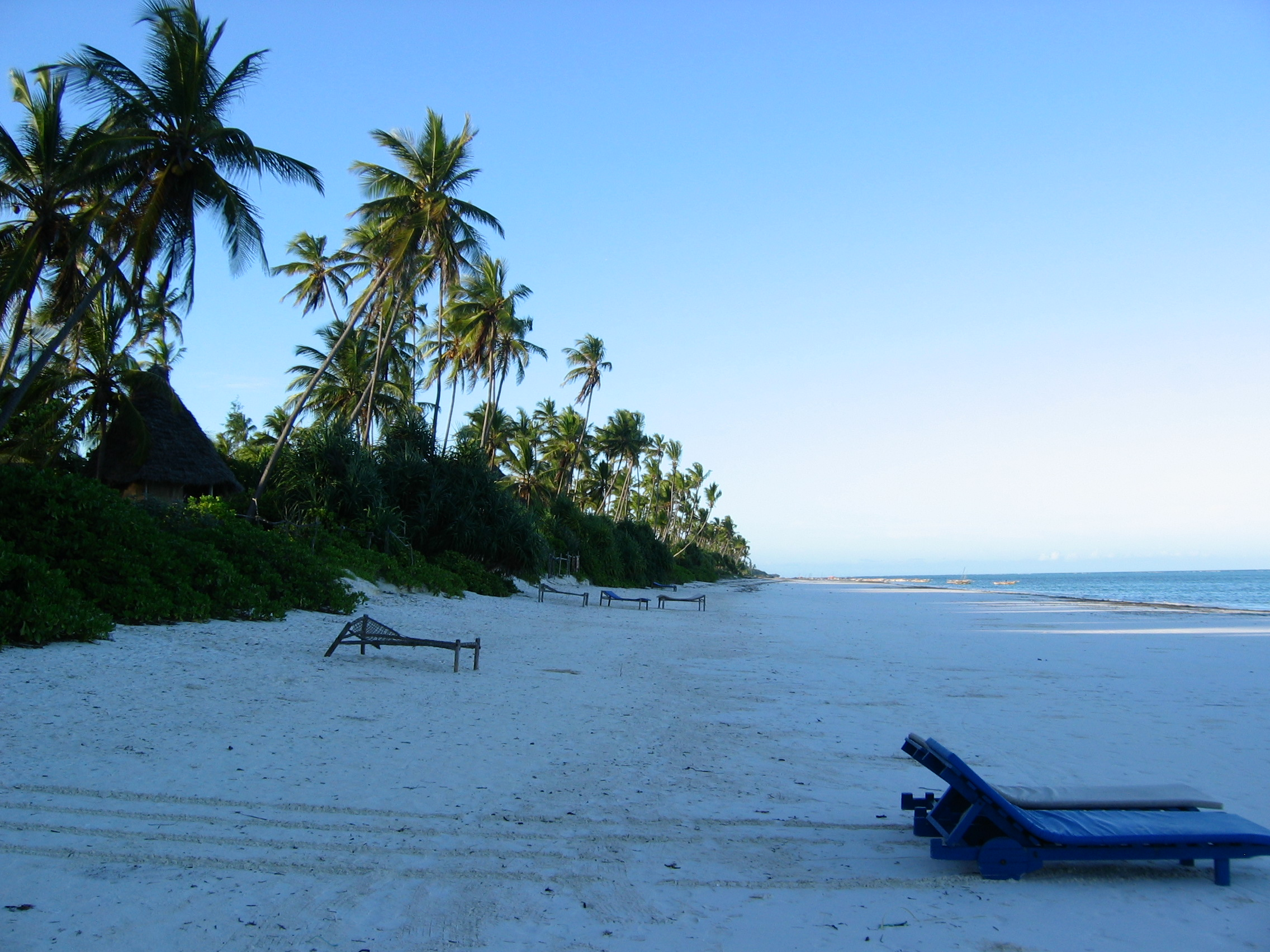 Pristine Beach East Zanzibar